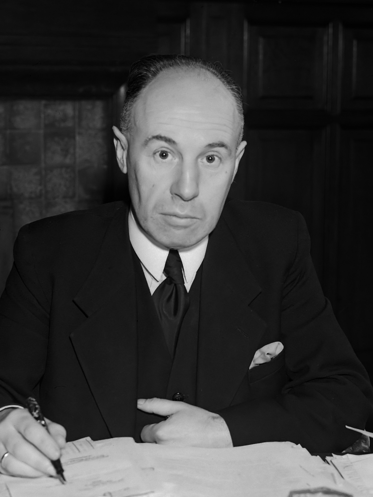 Dr. M.J. [Max] Prinsen 1945